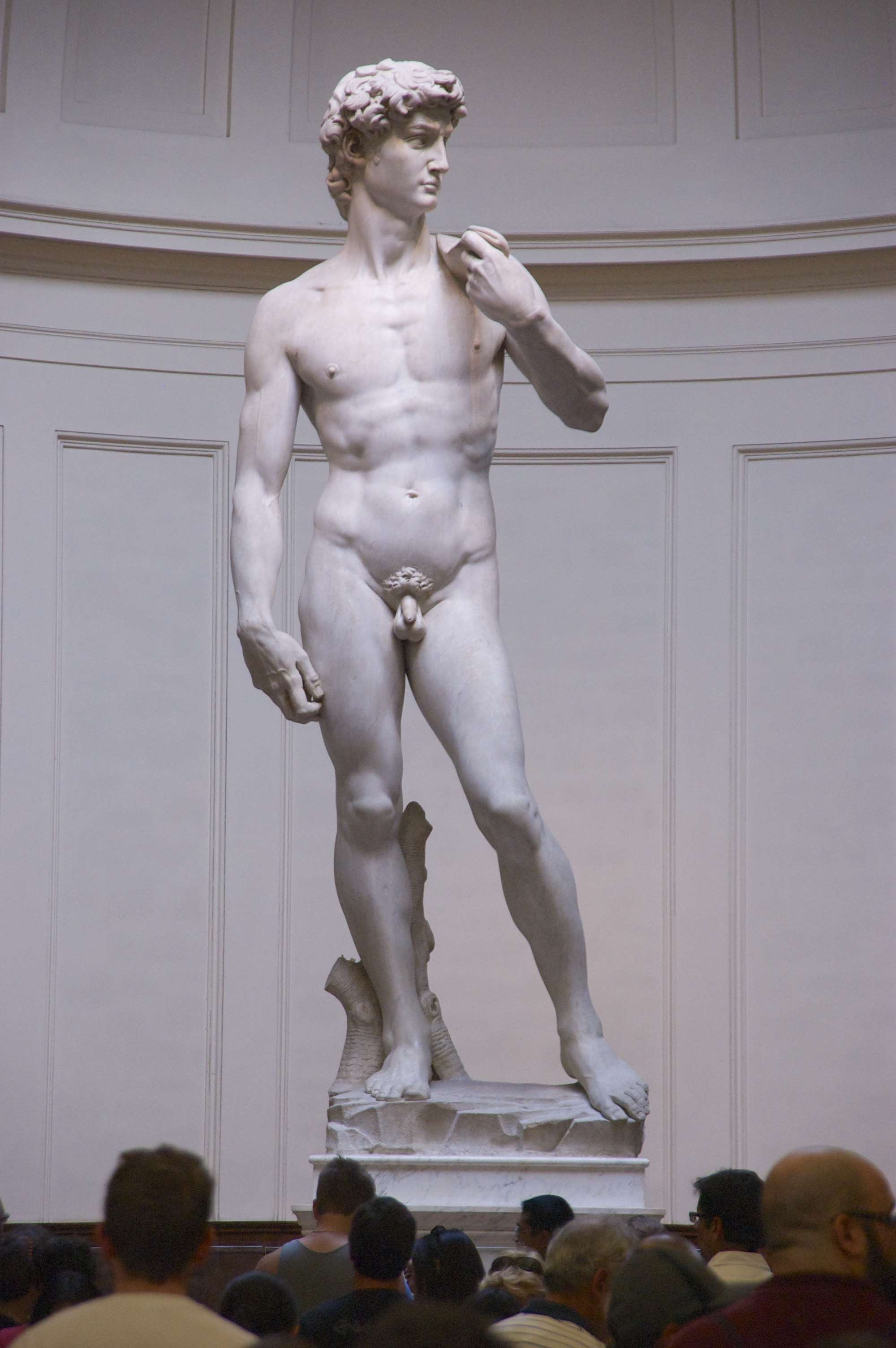 David de Michel-Ange (vue de face)